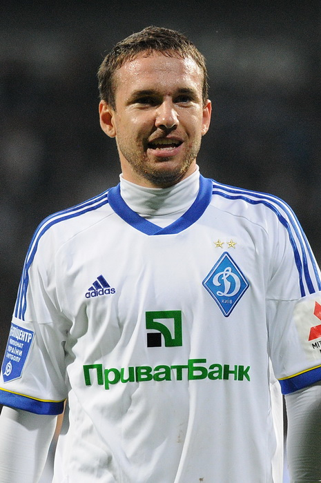 Andriy Bohdanov in 2012